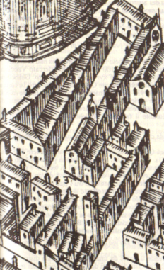 Palazzo_arcivescovile_firenze,_carta_del_bonsignori_(1584), pd old